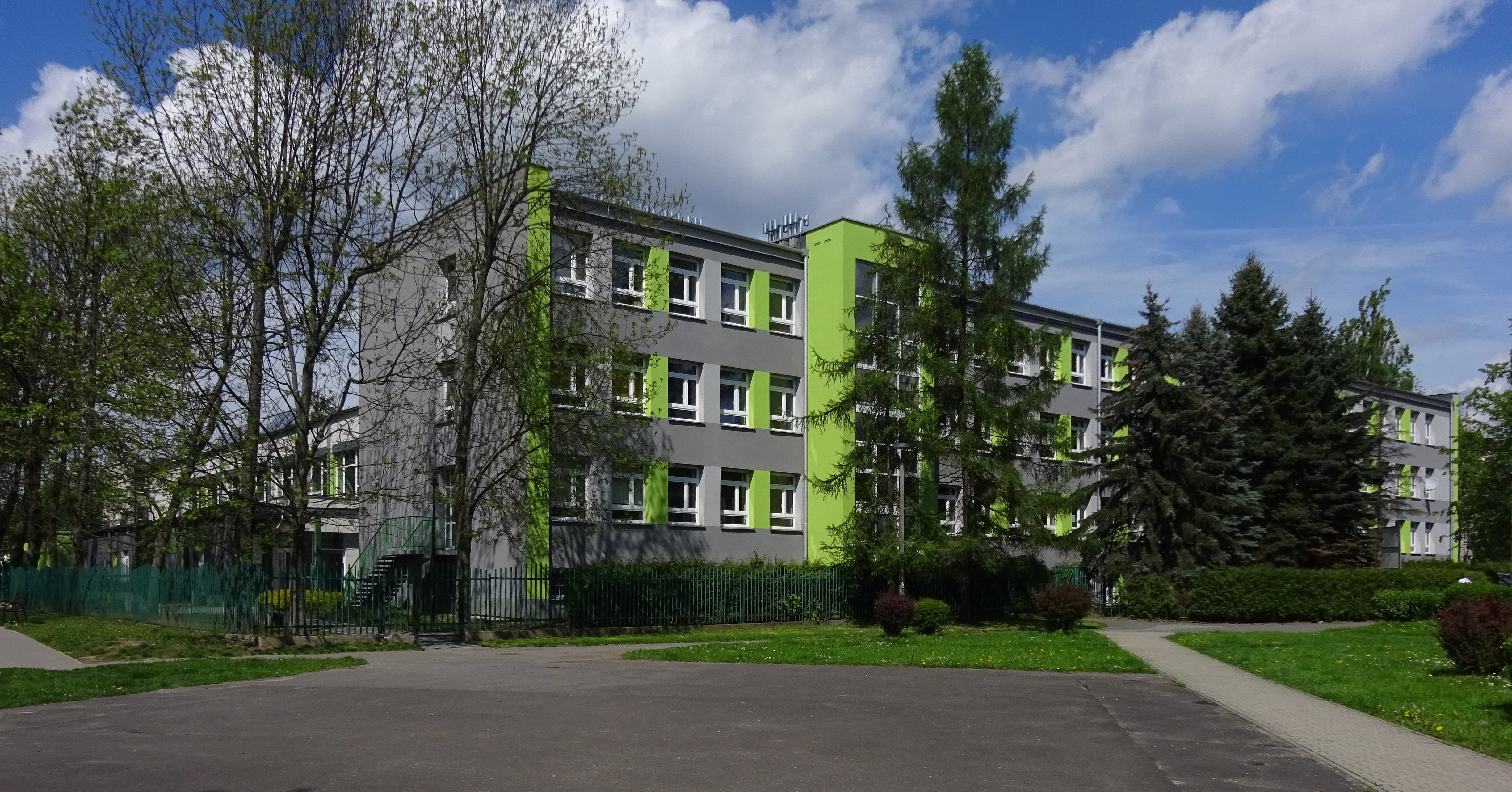 III Liceum Ogólnokształcące im. Jana Kochanowskiego i Hala Widowiskowo-Sportowa Dzielnicy XVI Bieńczyce w Krakowie na osiedlu Wysokim. Widok od strony Plant Bieńczyckich. 2019